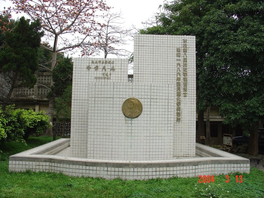 竹中諾貝爾獎牌 -這是我自己拍的